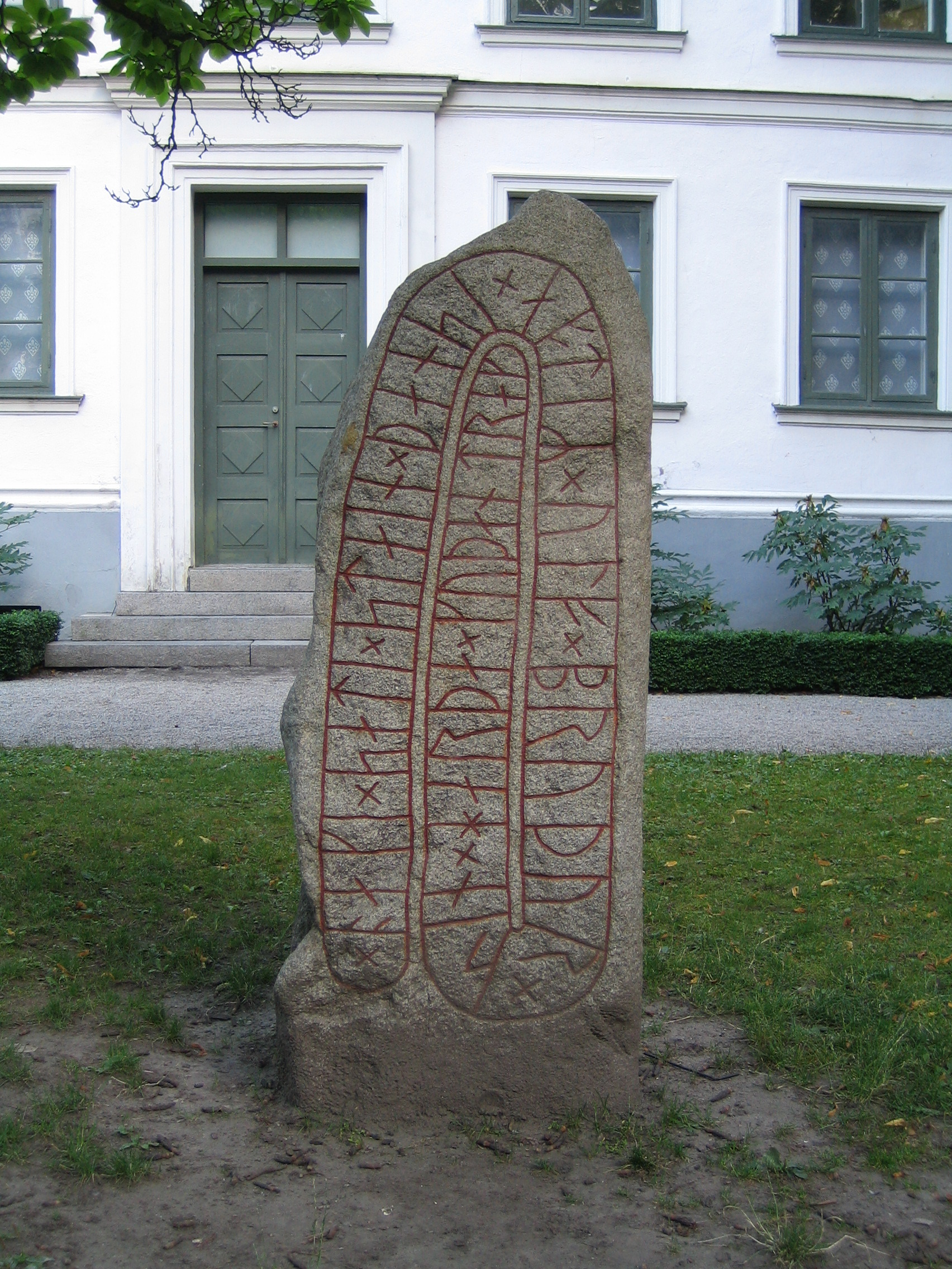 Bjäresjöstenen 2, Kulturen i Lund, signum DR 288.